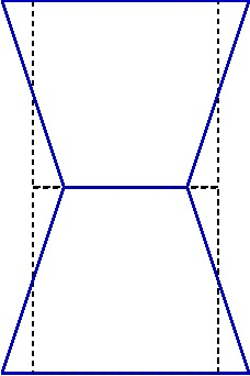 有限要素法におけるアワーグラスモードの説明